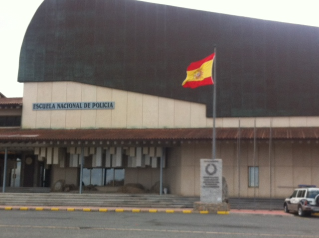 Entrada principal ENP situada en Ávila (España)